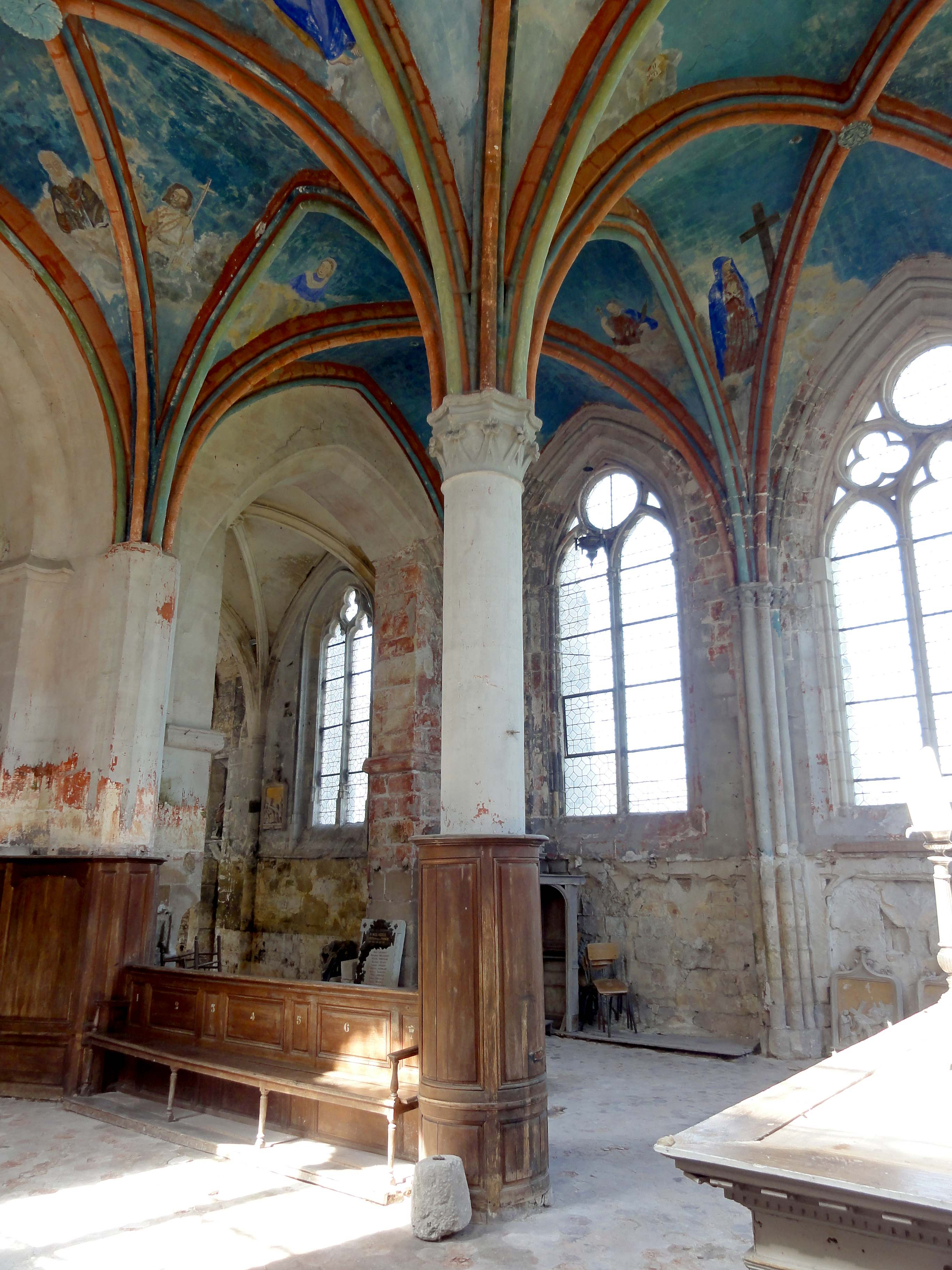 Intérieur de l'église (voir titre).